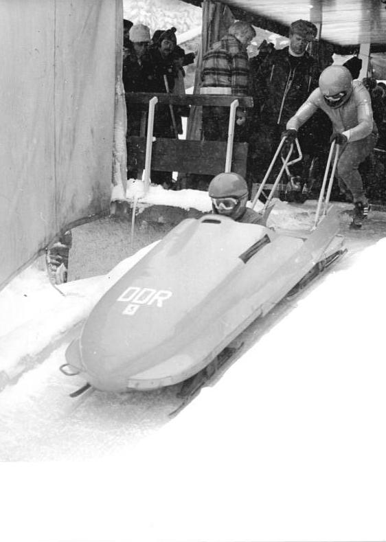 Horst Schönau, Andreas Kirchner ADN-ZB Schaar 31.3.79-ob-Bez. Suhl: DDR-Meisterschaften im Zweier-Bob-Nach zwei Durchgängen der DDR-Meisterschaft im Zweierbob, die am 31.3.79 in Oberhof begann, liegt der von Titelverteidiger Horst Schönau gesteuerte Bob in Führung. Der ASK-Sportler versucht sich bei der diesjährigen Meisterschaft mit Andreas Kirchner.